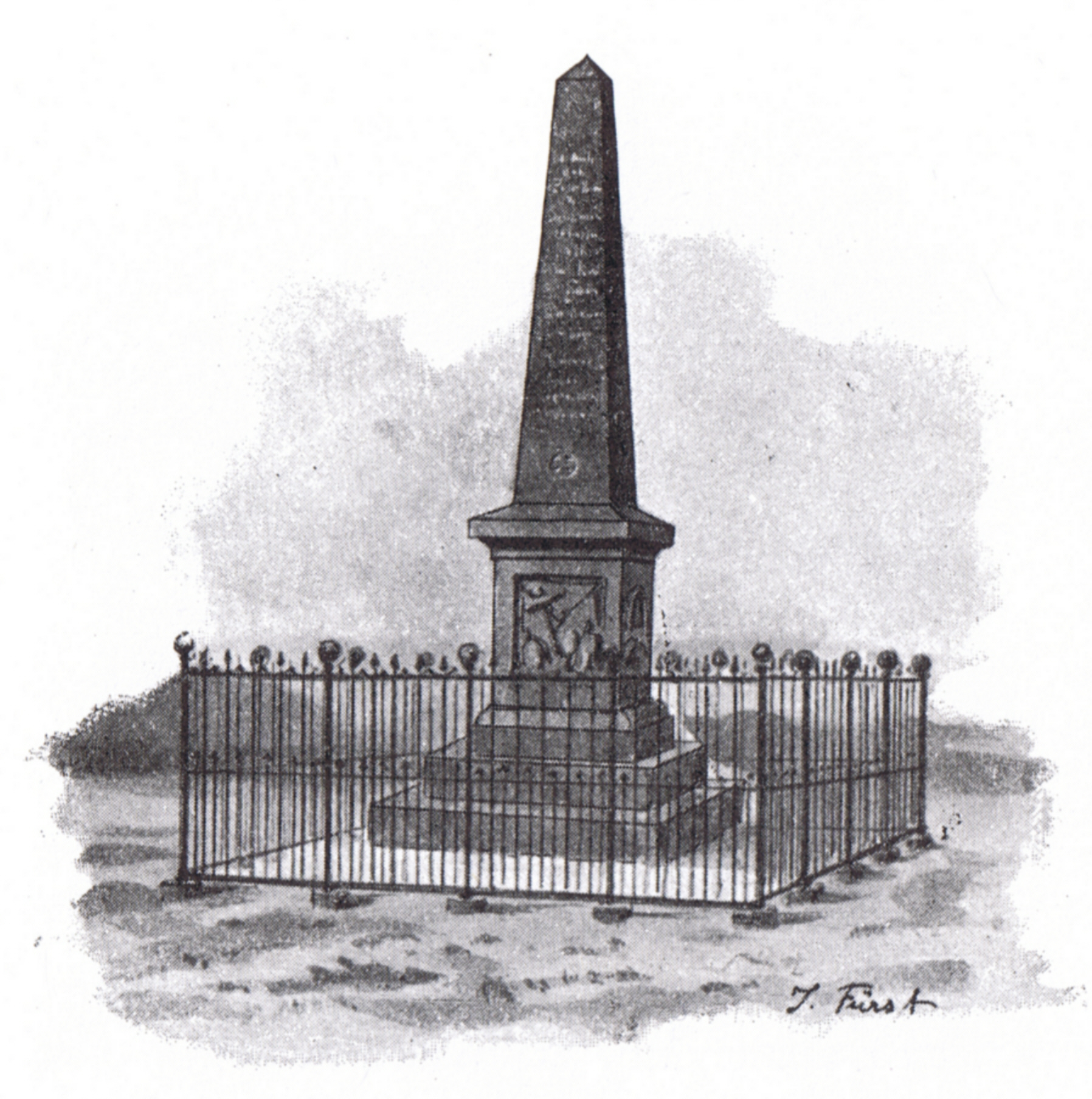 Das Denkmal an den Schleswig-Holsteinischer Krieg (1848–1851) bei Idstedt, Zeichnung von Julius Fürst um 1895.